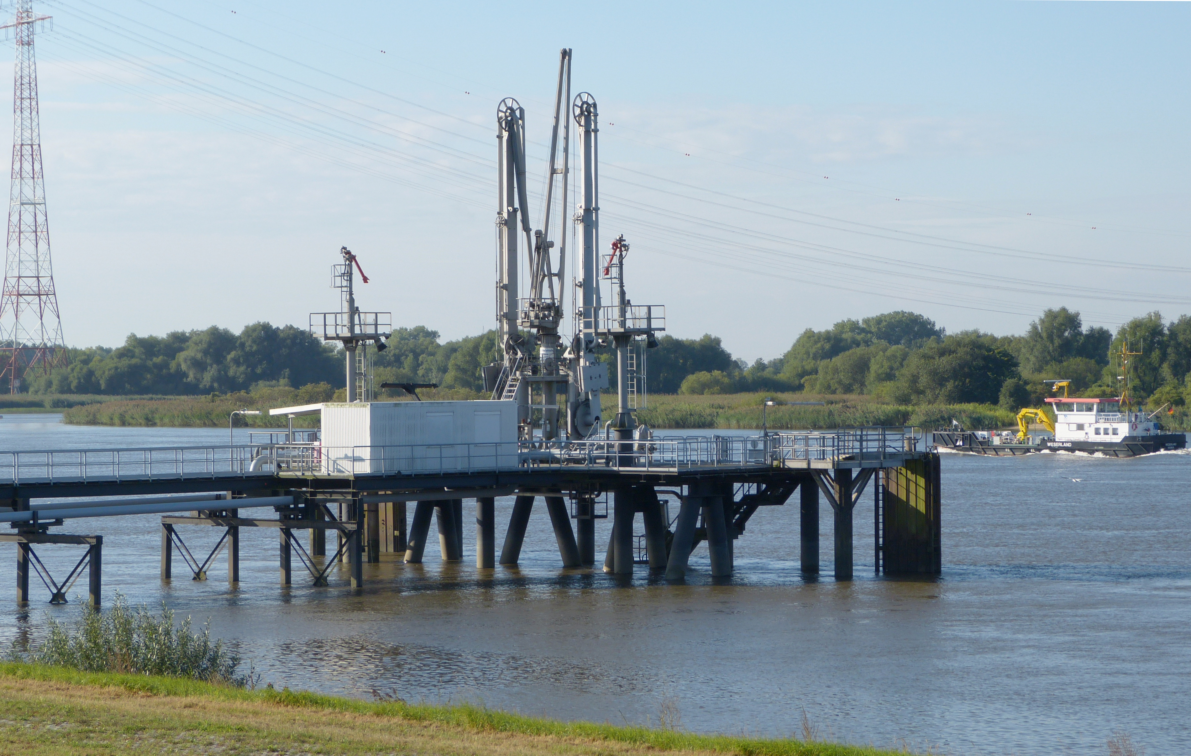 Ölumschlaganlage Bremen-Farge, nördliches Terminal